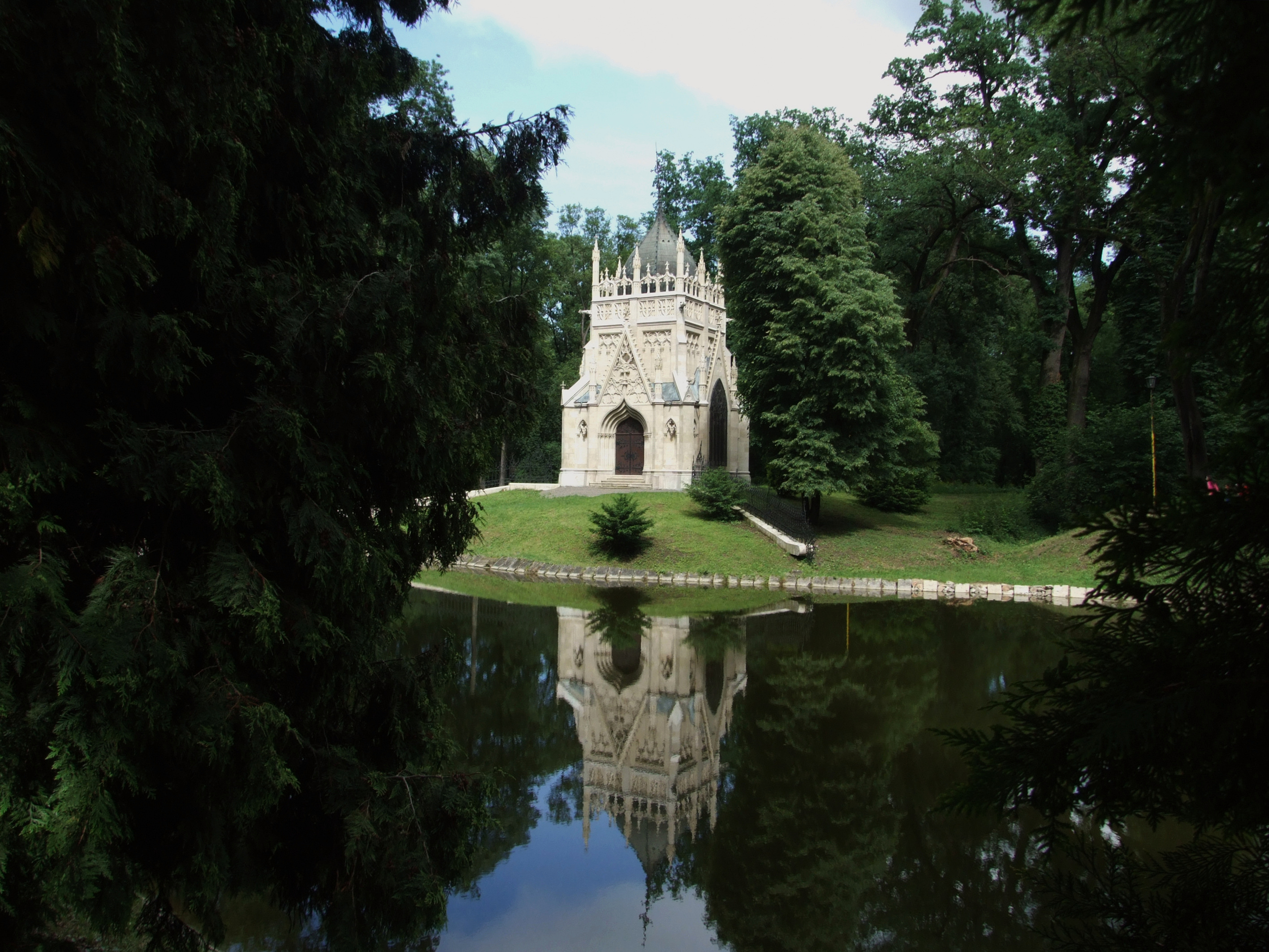 Andrássyovské mauzóleum, arch. Artur Meining, 1893